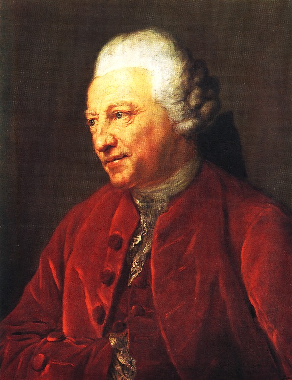 Portrait des Kunstsammlers Christian Ludwig von Hagedorn.